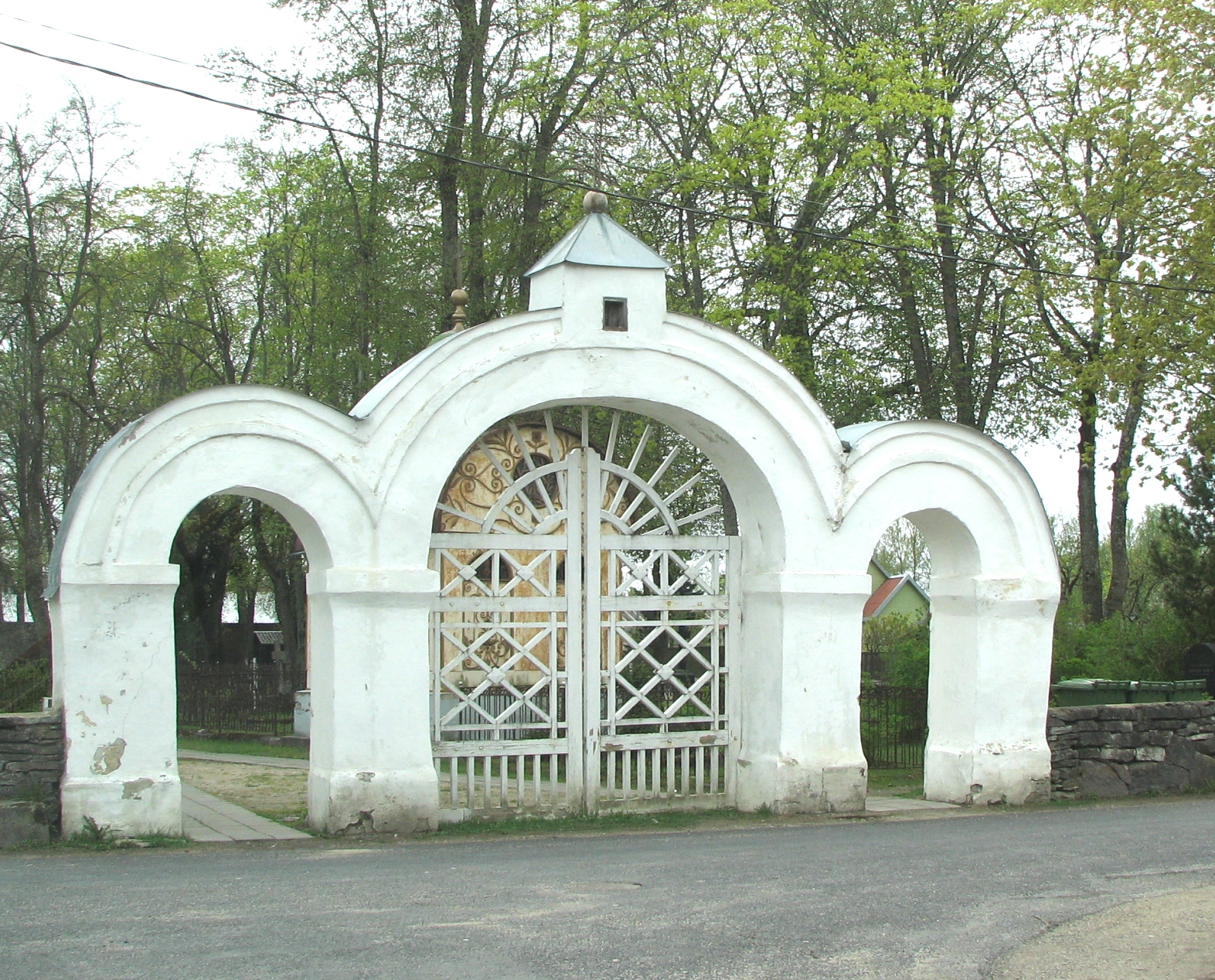 Haapsalu vana kalmistu värav